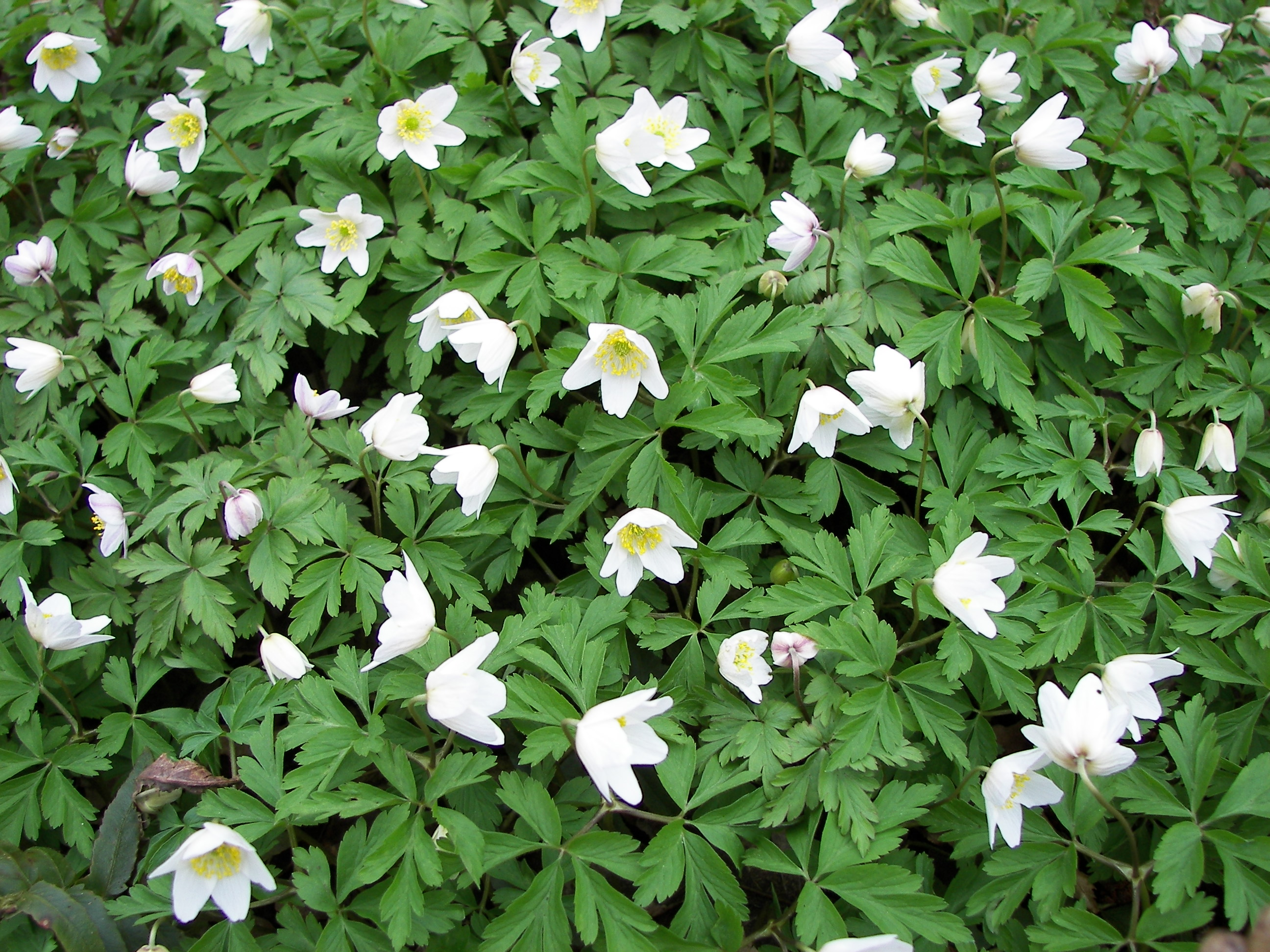 Buschwindröschen (Anemone nemorosa) im Neuen Botanischen Garten Marburg, Abteilung Frühlingswald